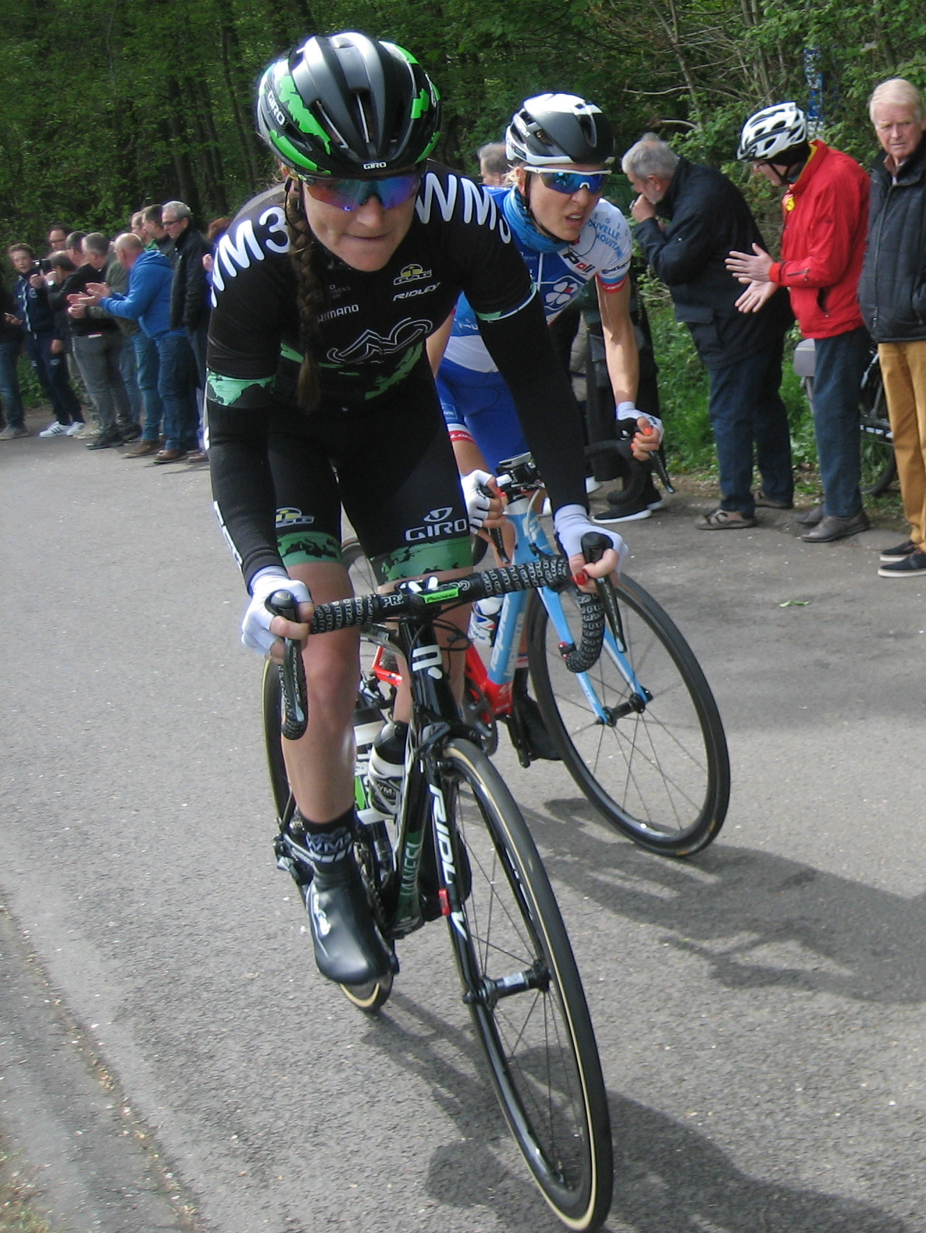 Na 45km, beklimming van de Eyserbosweg, in de Amstel Gold Race Ladies Edition 2017.